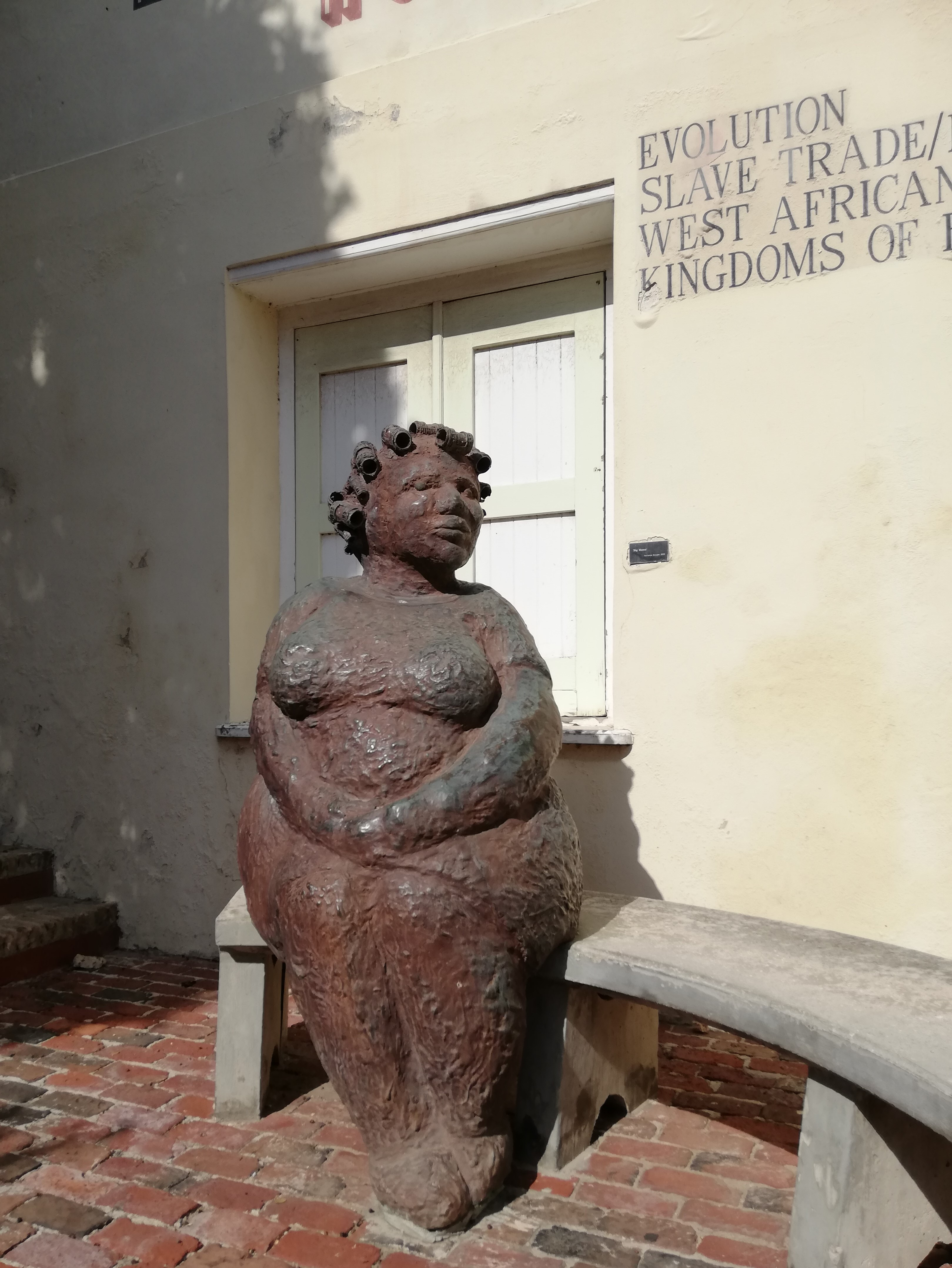 Sculpture Big Mama by Curaçao artist Hortence Brouwn, in front of museum Kurá Hulanda, Willemstad, Curaçao